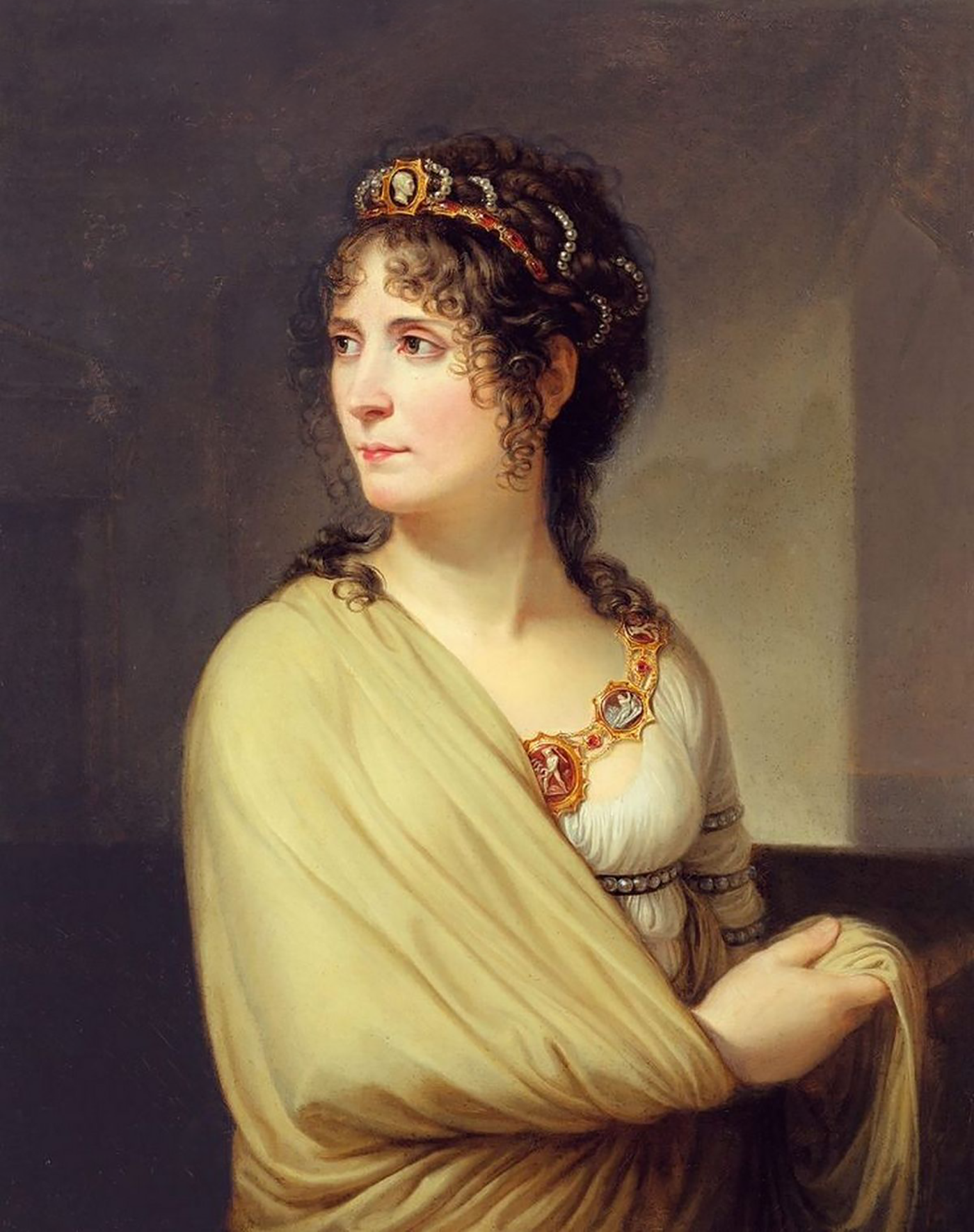 L'imperatrice Giuseppina ritratta da Andrea Appiani.